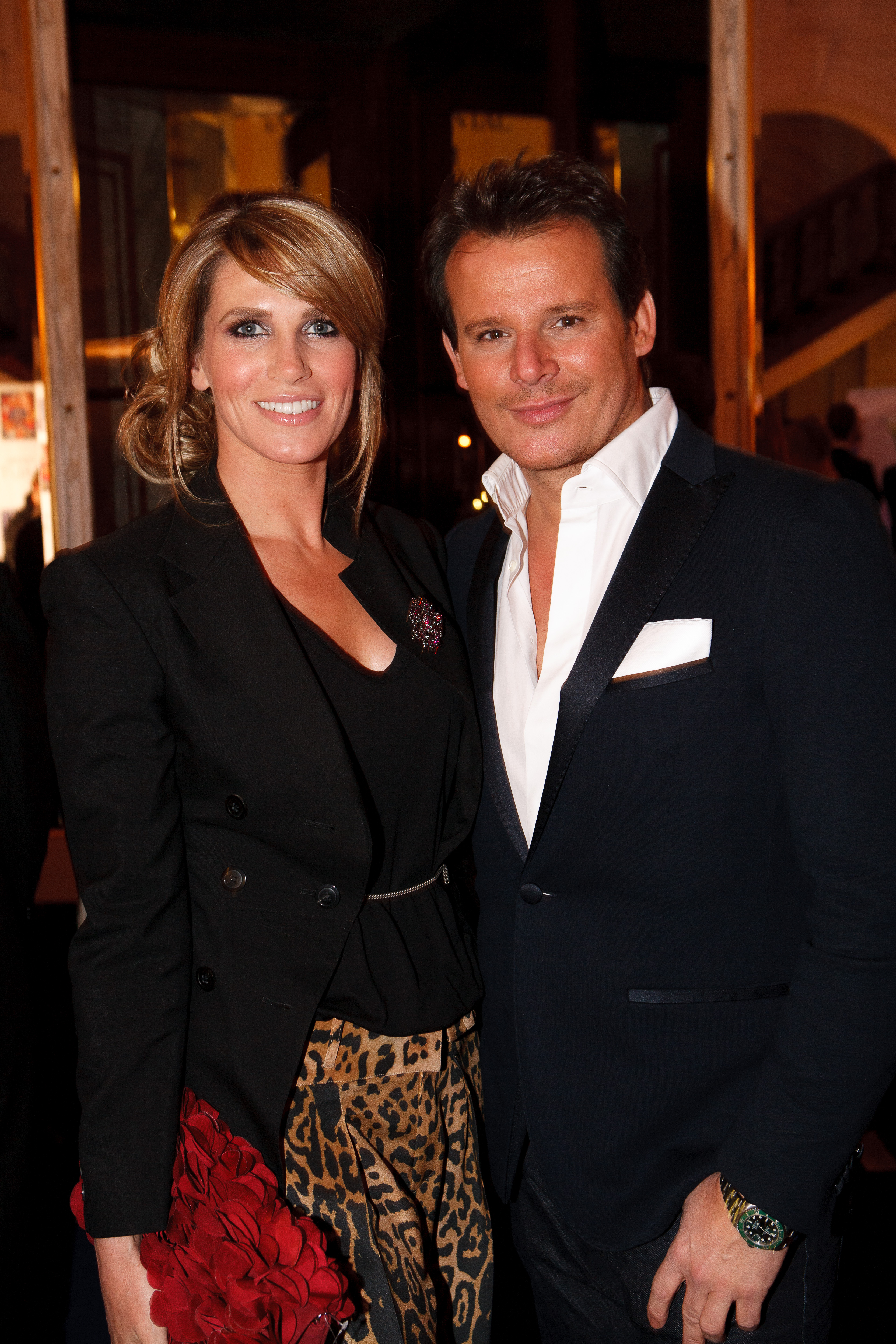 Foto: Roy Beusker